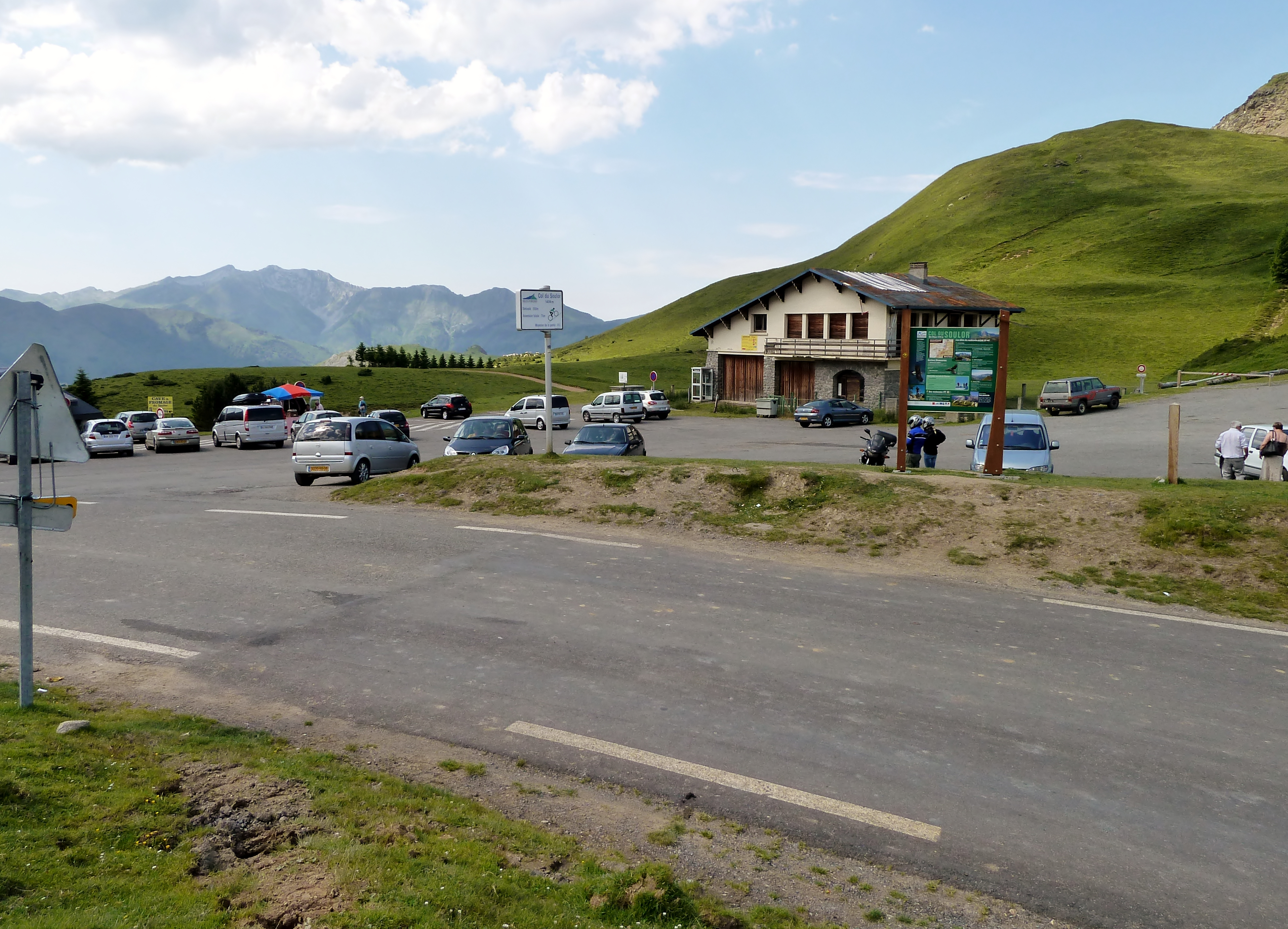 Col du Soulor